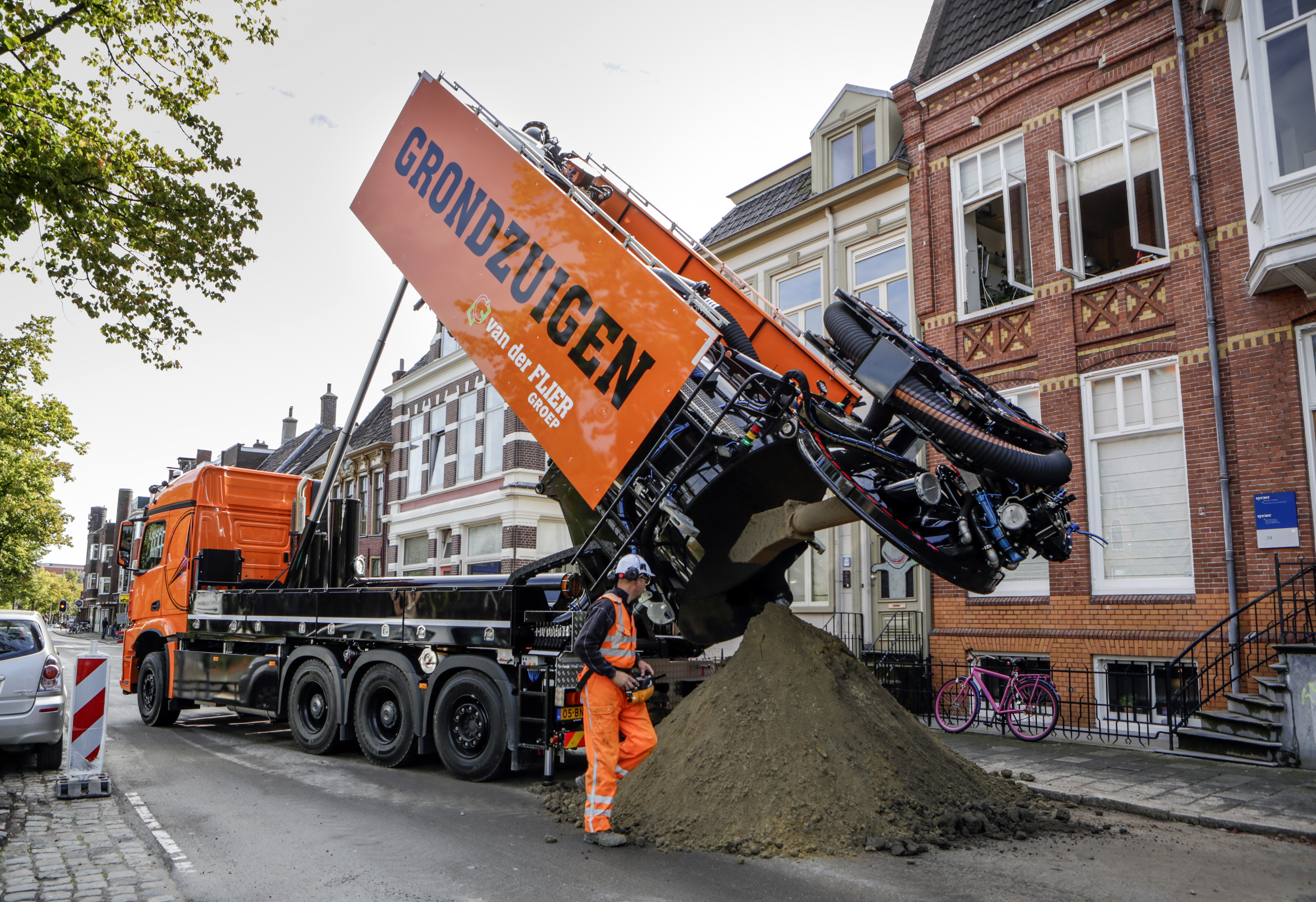 Op bovenstaande foto zien we een grondzuigauto dat gebruik maakt van de vacuümtechniek.